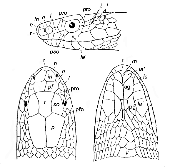 Colubrid scale terminology